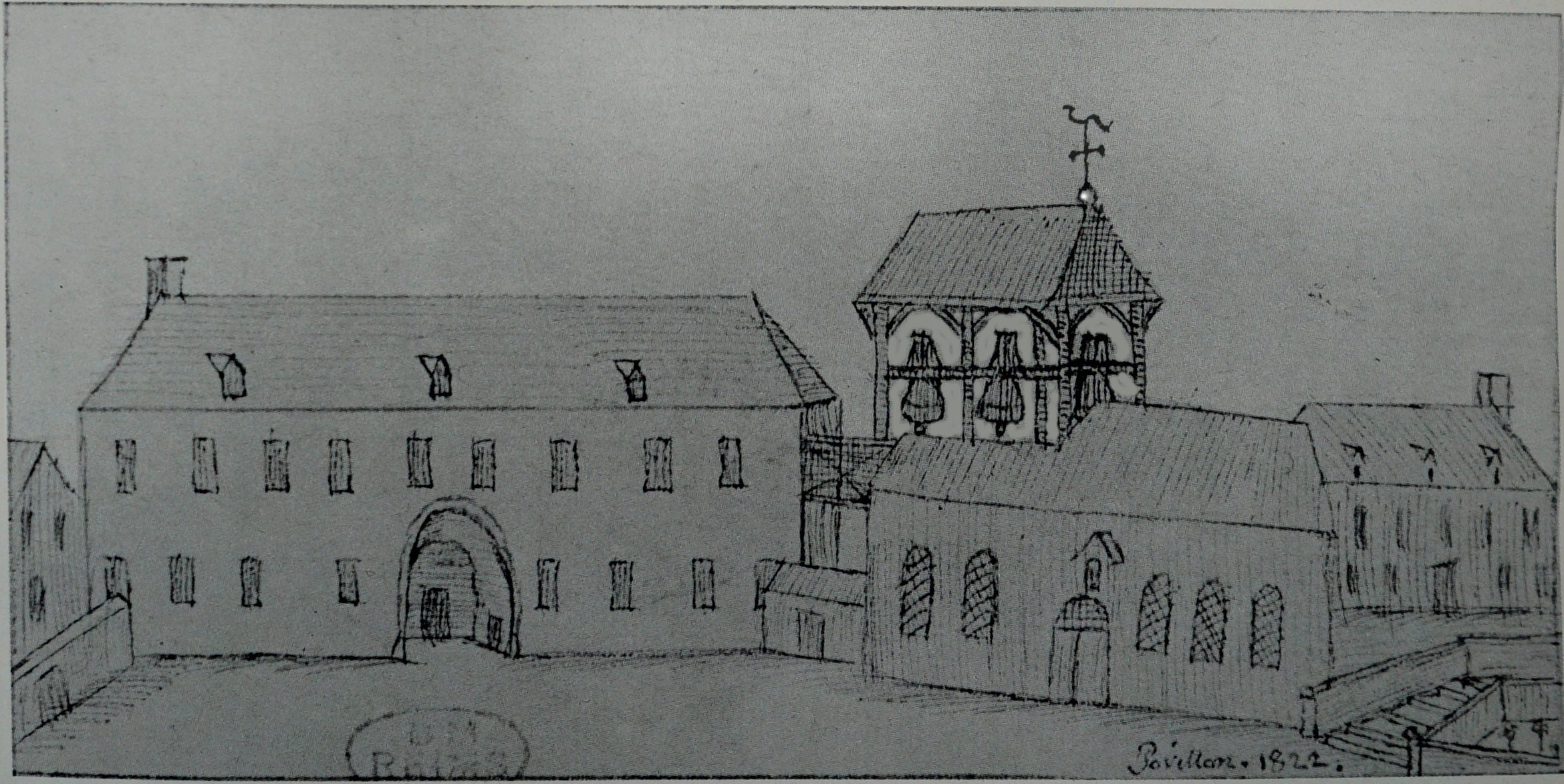 vue de 'l'anicen hôpital.